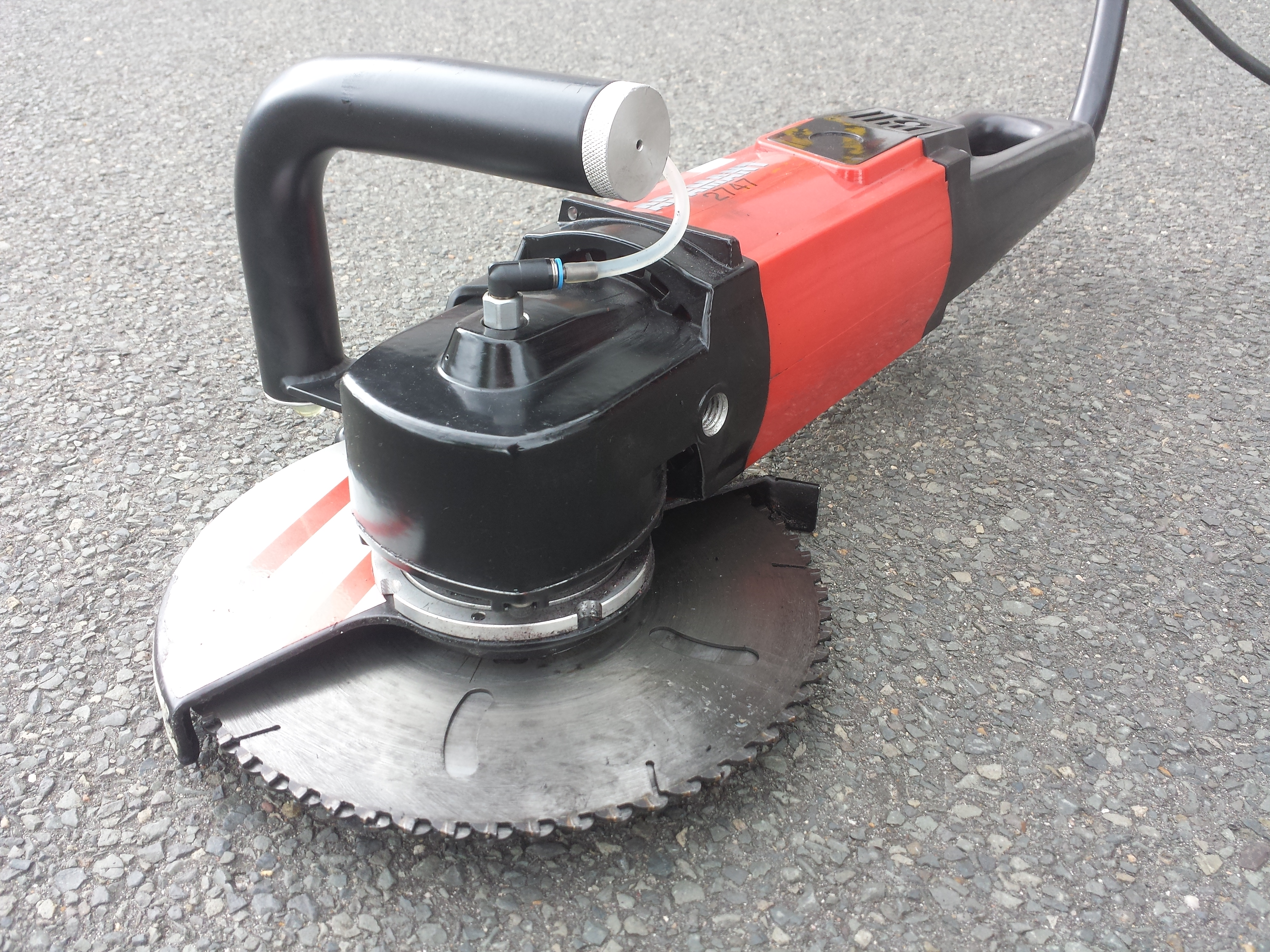 Säge mit zwei gegenläufigen Sägeblättern